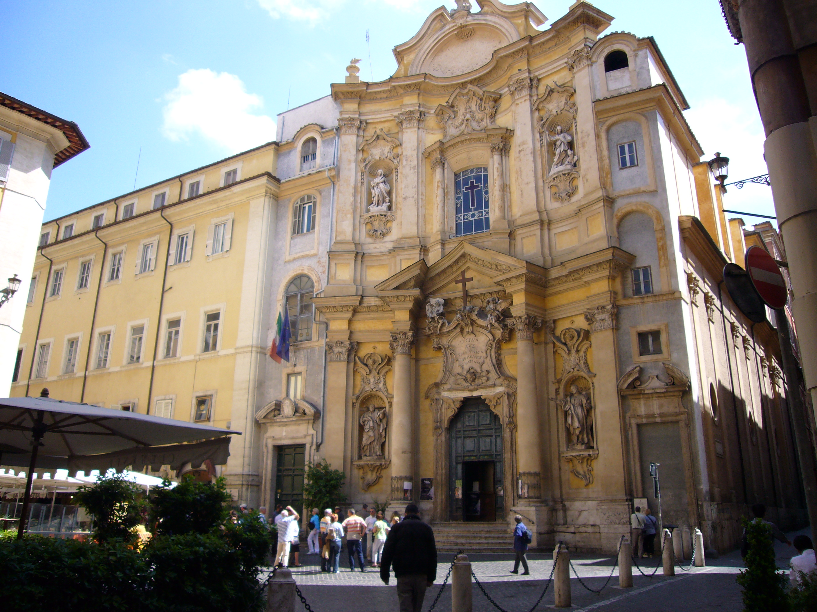 Roma, chiesa e piazza della Maddalena a S. Eustachio